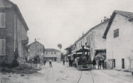 Stazioni di Vaglierano